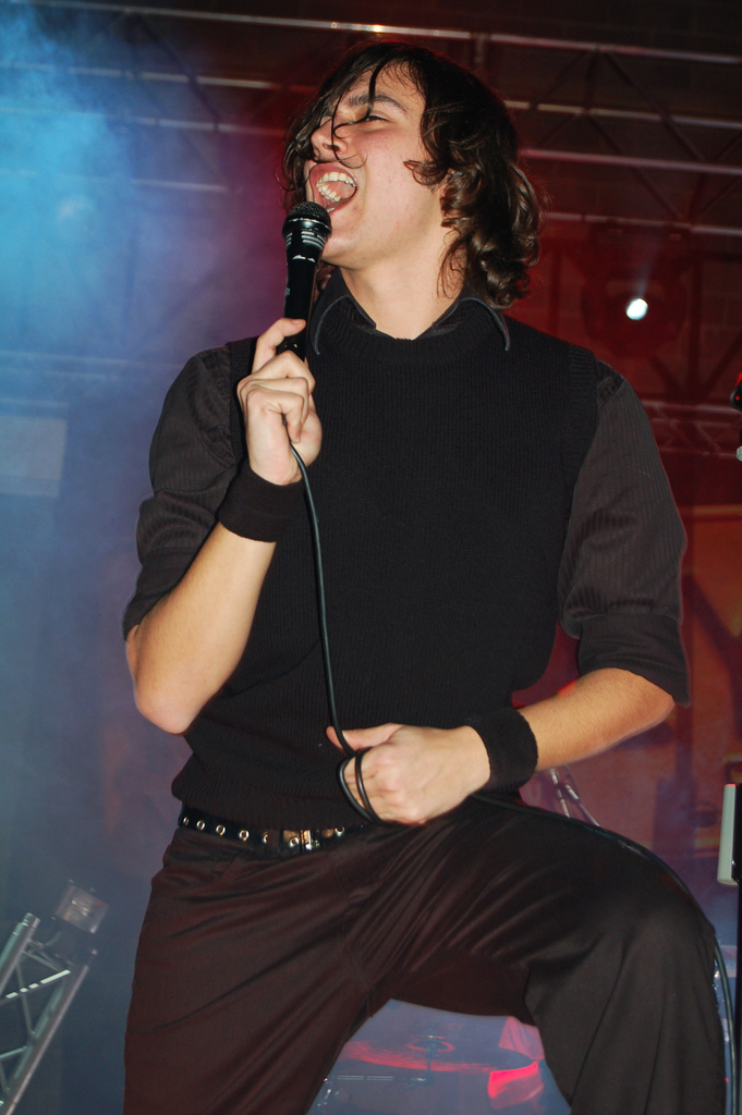 se lo vuoi... tutto è possibile...